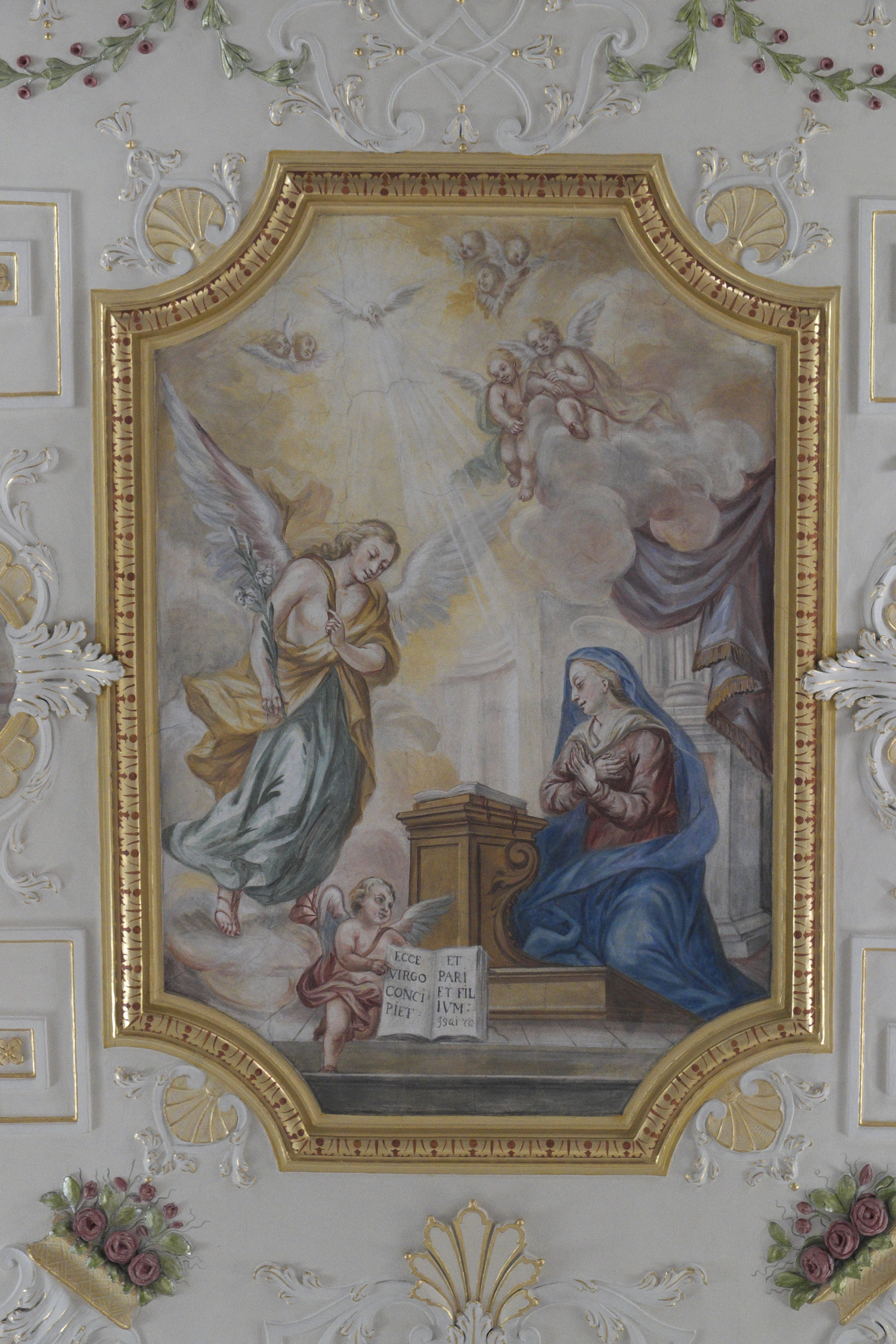 Katholische Pfarrkirche St. Benedikt in Odelzhausen im Landkreis Dachau (Bayern/Deutschland), Deckenmalerei und Stuck im Langhaus; Darstellung: Verkündigung